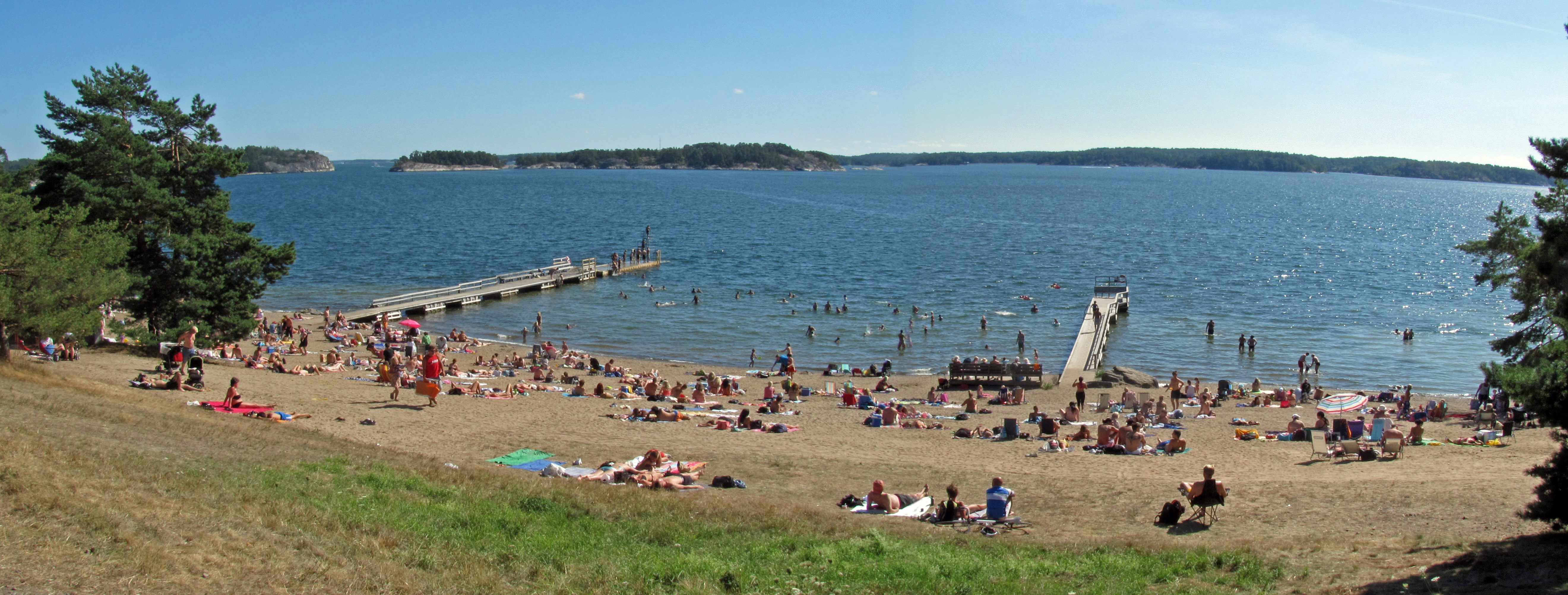 Årsta Havsbad, badplats